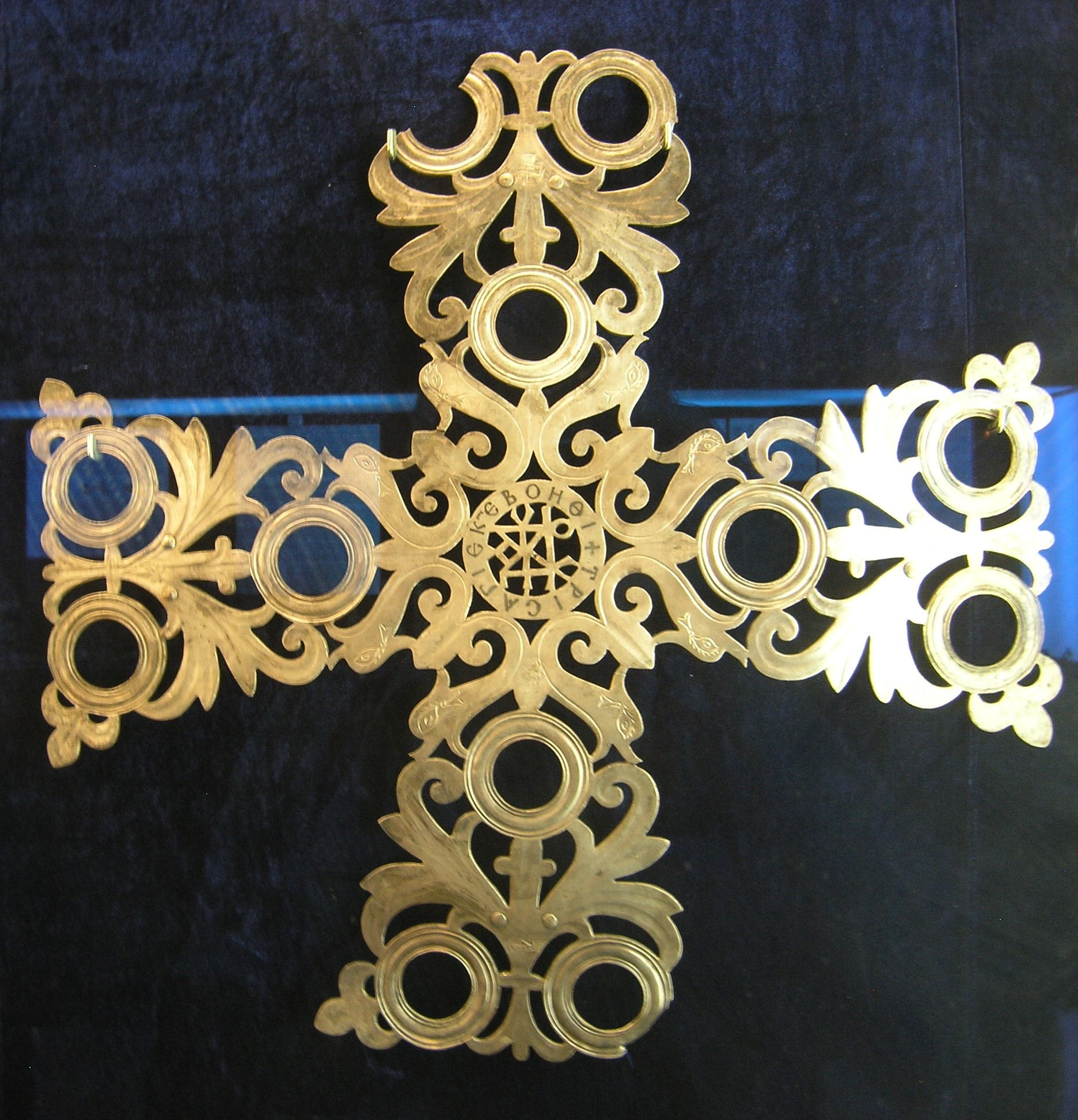 Kreuzförmiger Polykandelaber, Teil des Sion-Schatzes im Archäologischen Museum Antalya